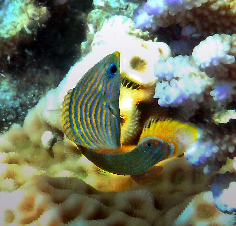 femmina di Halichoeres vrolikii